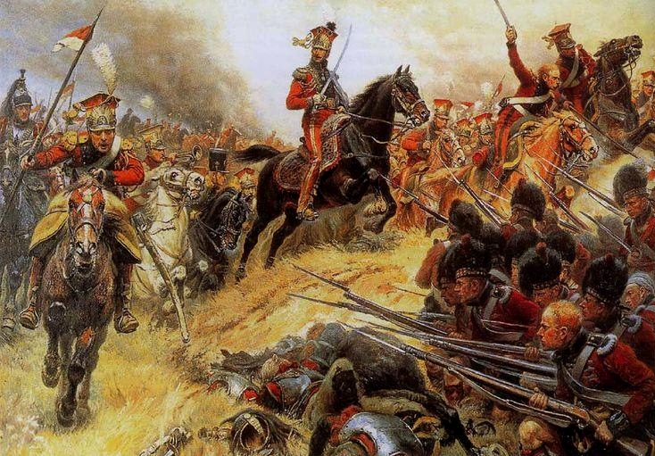 Le général de Colbert-Chabanais menant les lanciers rouges à la bataille de Waterloo.